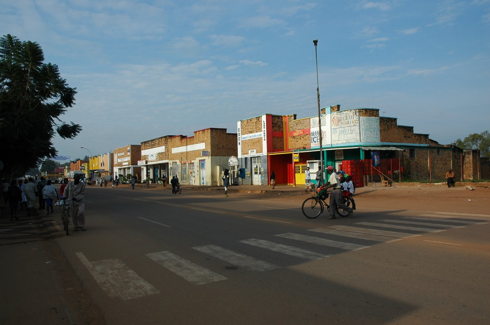 'n straat in Butare.